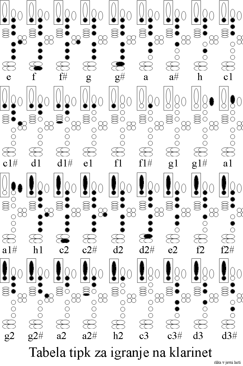 Slika, ki prikazuje katere tipke na klarinetu je potrebno stisniti, da dosežemo željeni ton. Slika je začasna v najboljšem primeru ... je pa (dokaj očitno :D ) lastno delo, dano v javno last. Več se očitno ne da.